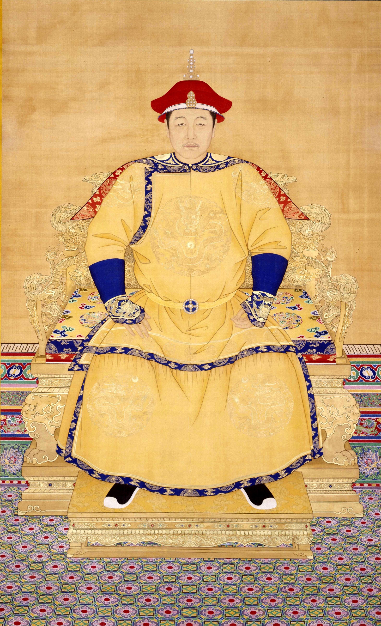 清 佚名 《清世祖顺治皇帝朝服像》